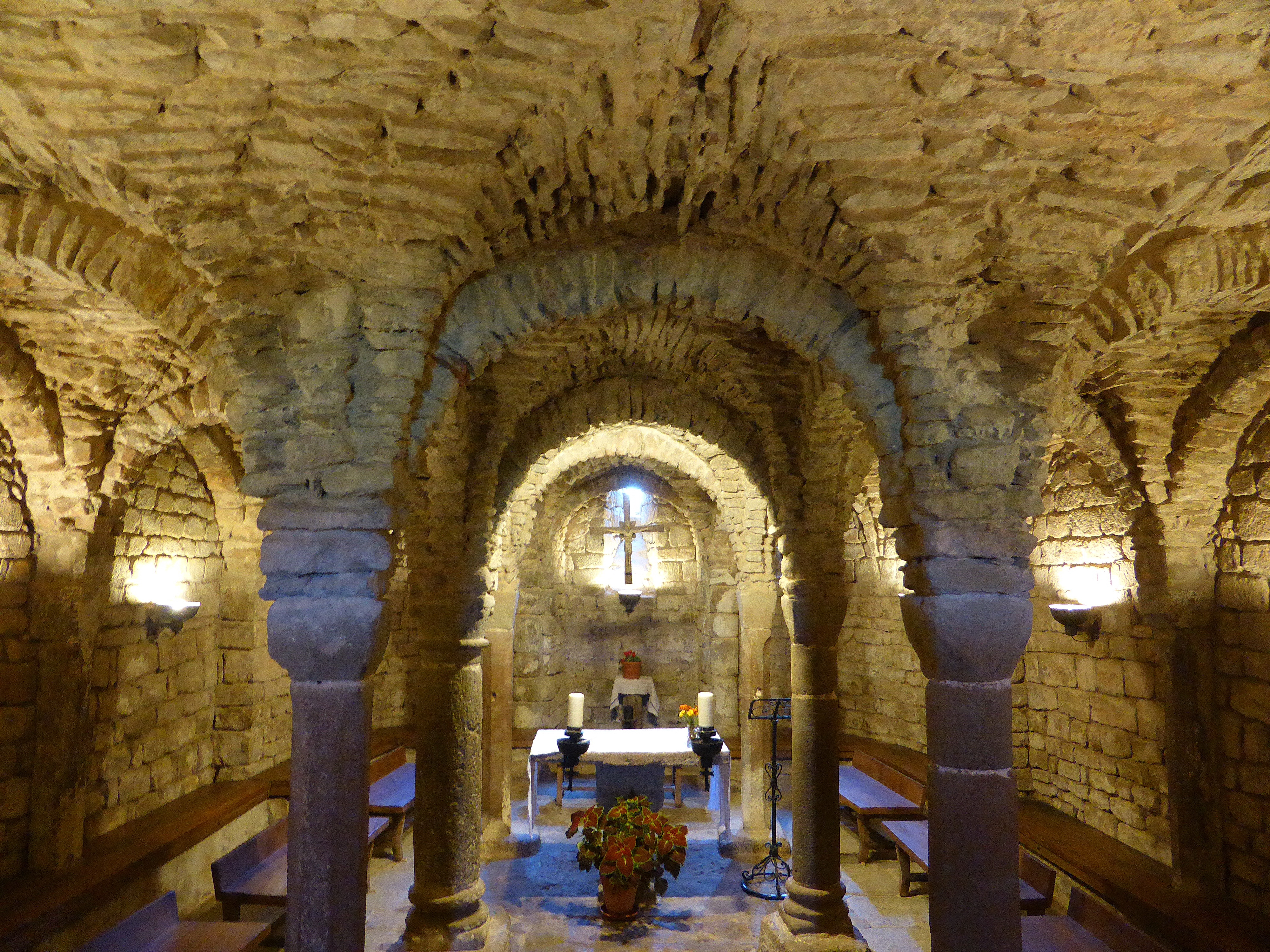 Imatge de la cripta de Sant Esteve d'Olius